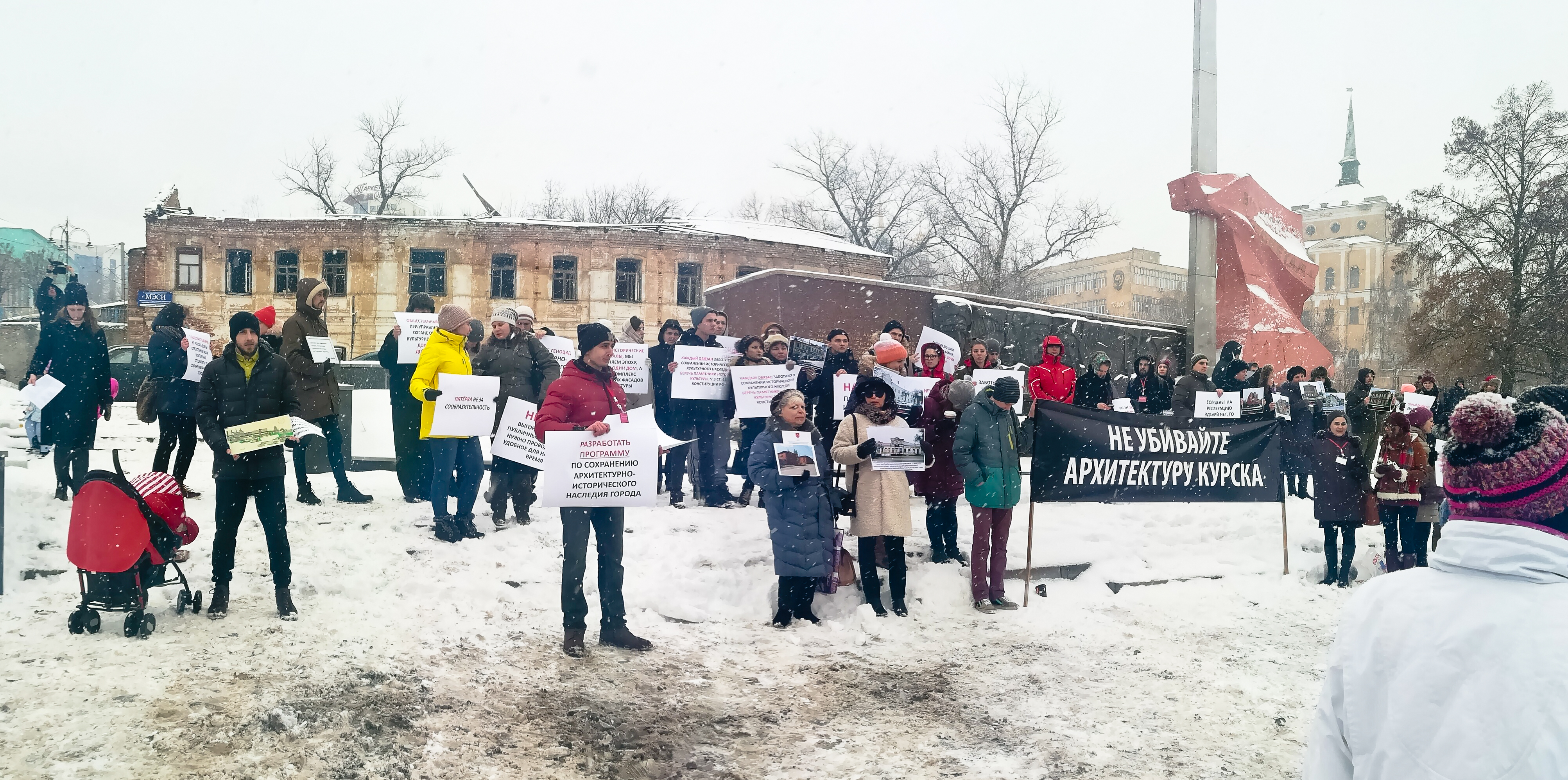 Пикет Пикет Не убивайте архитектуру Курска 2018, 17 февраля, посвященный сохранению наследия города Курска